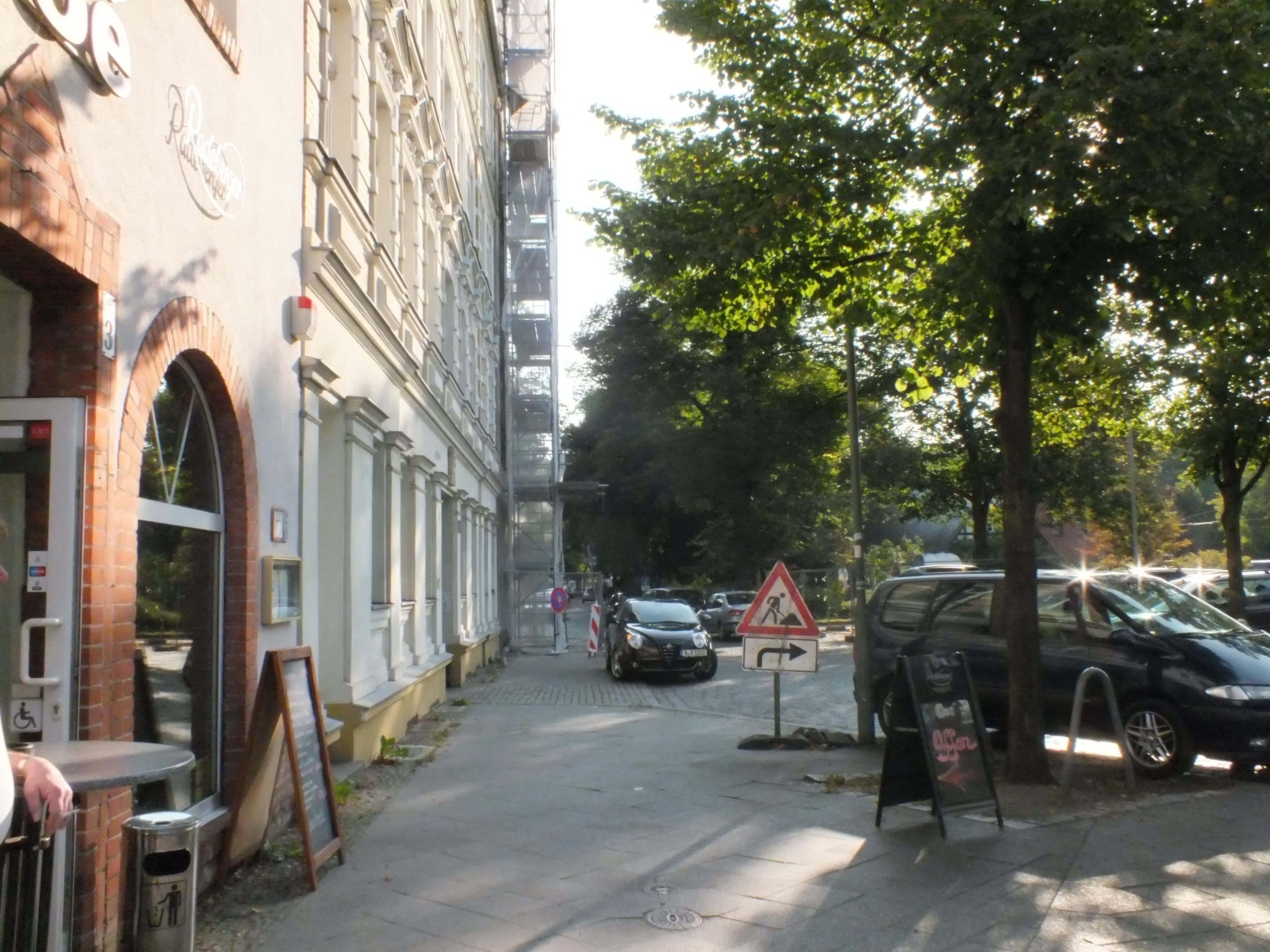 Straße in Berlin-Köpenick, Am Generalshof